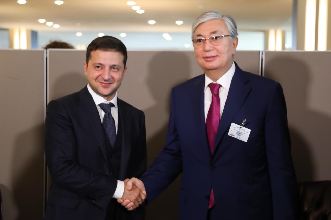 Володимир Зеленський та Касим-Жомарт Токаєв на генасамблеї ООН